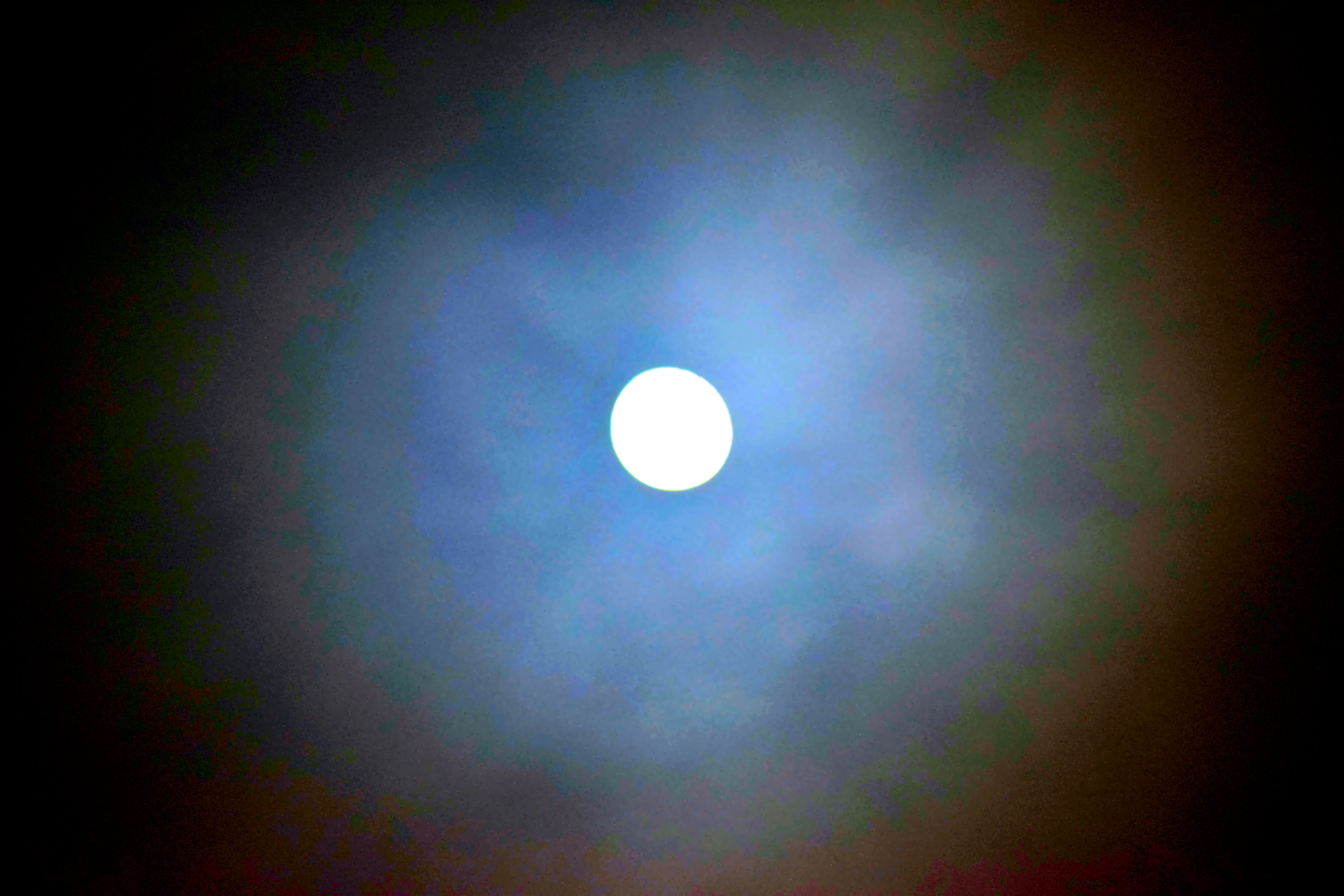 Vollmond mit mehrfarbiger Korona